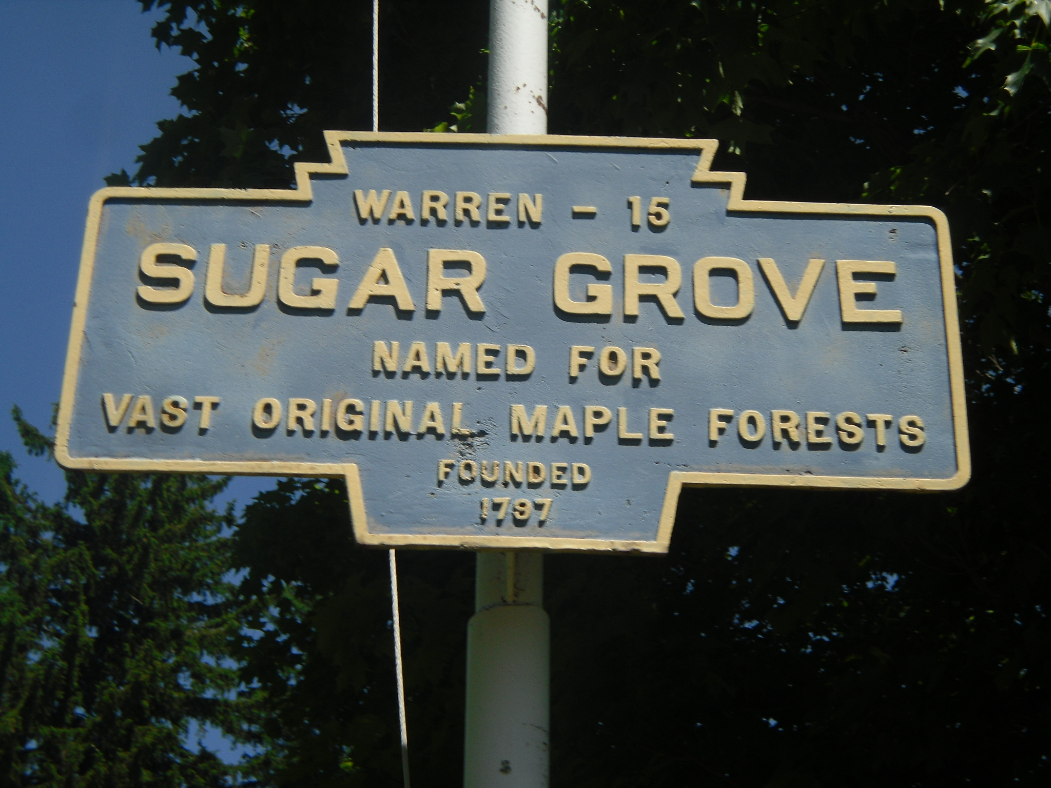 Keystone Marker for Sugar Grove, Pennsylvania